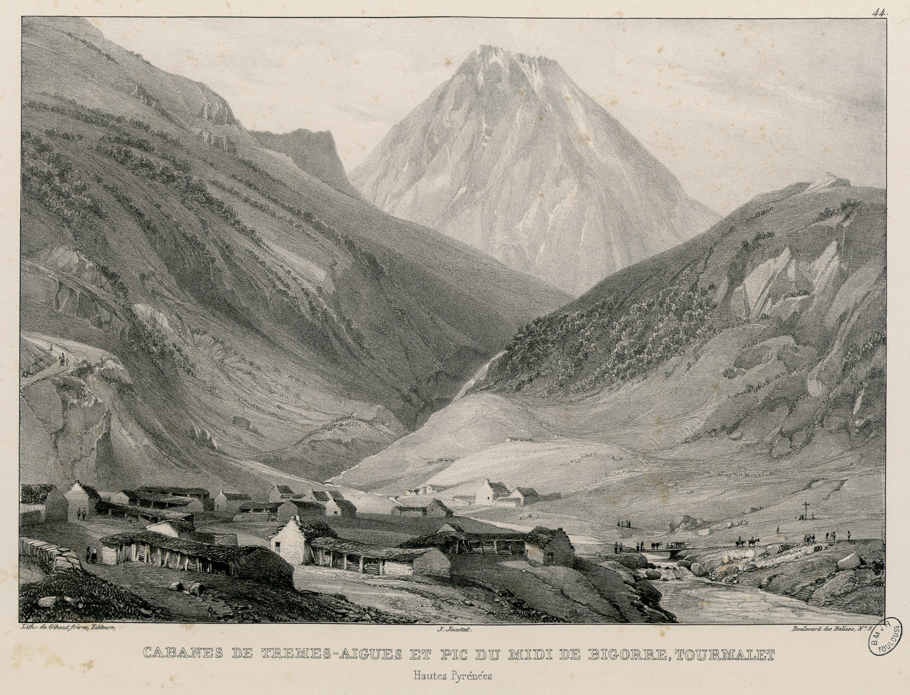 Fait partie de la première partie d'un recueil de planches lithographiées. Titre lithographié et 50 lithographies numérotées de 1 à 50, plus 4 lithographies supplémentaires numérotées de 1 à 3 (ici pl. 53, 54, 55) et une sans numéro (ici pl. 52). Deux planches sont numérotées 10, ce qui fait en tout un album de 55 pl. L'ouvrage de Jacottet est très rare quand il est complet des deux parties. Vignette lithographiée au titre : "Visite aux ruines de Beaucens, Vallée d'Argelez (Hautes Pyrénées)" Ancely, René (1876 - 1966). Possesseur